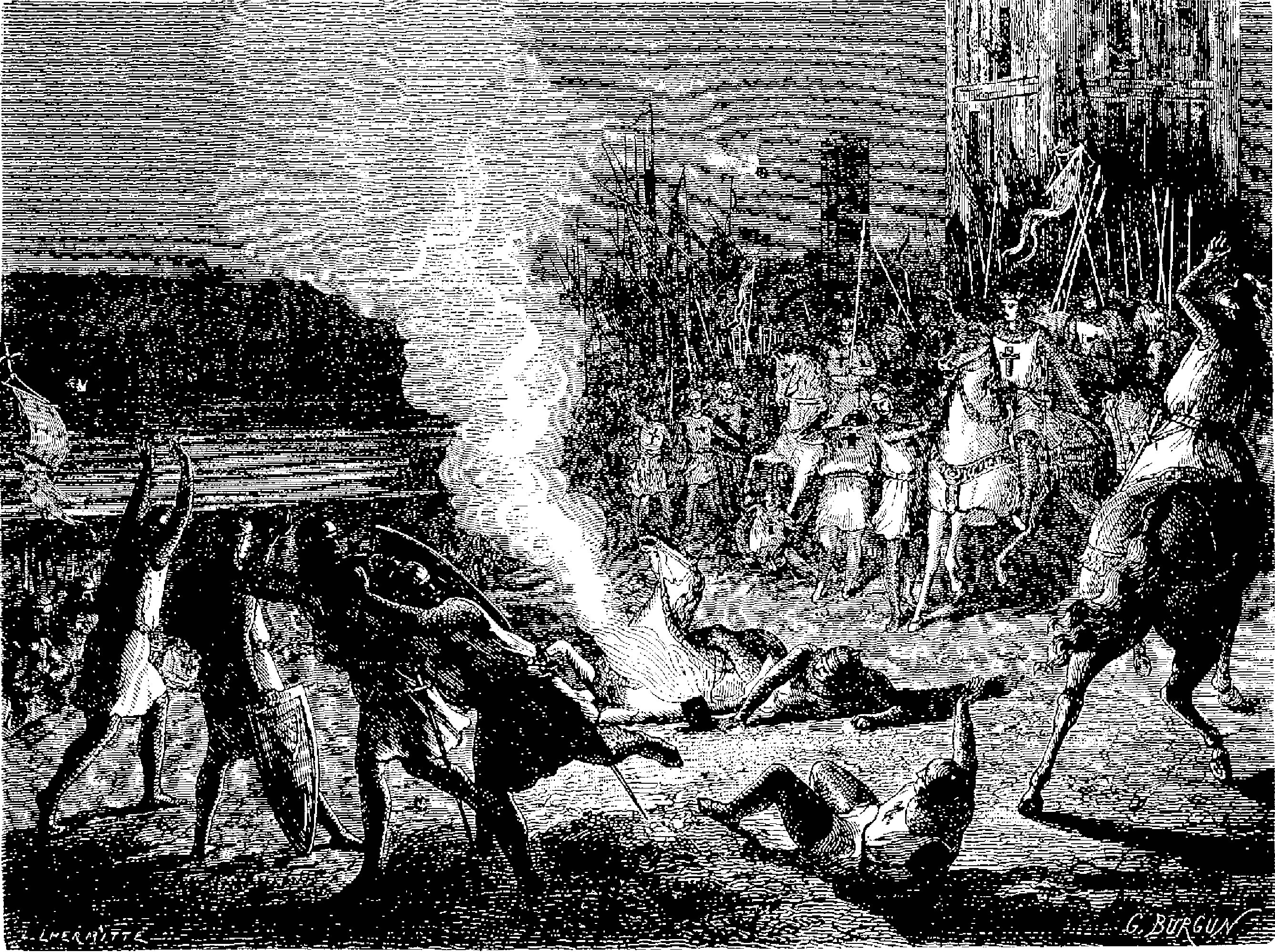 Les Sarrasins lancent le feu grégeois contre les tours de bois et les ouvrages préparés par l’armée de saint Louis, pour le passage d’une branche du Nil